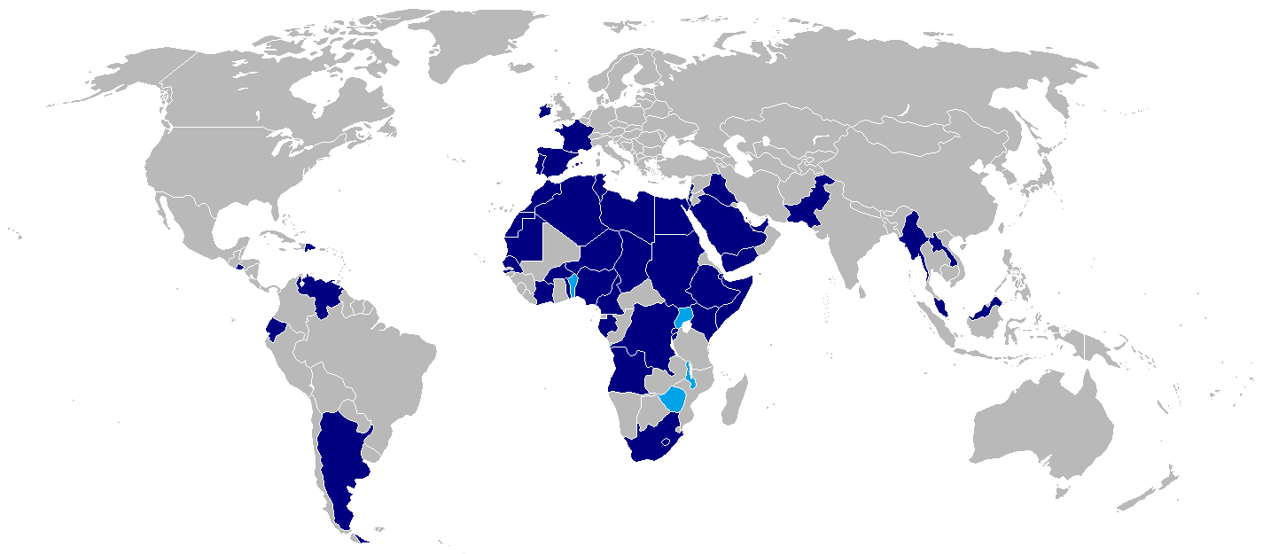 Mapa de los usuarios de Panhard AML